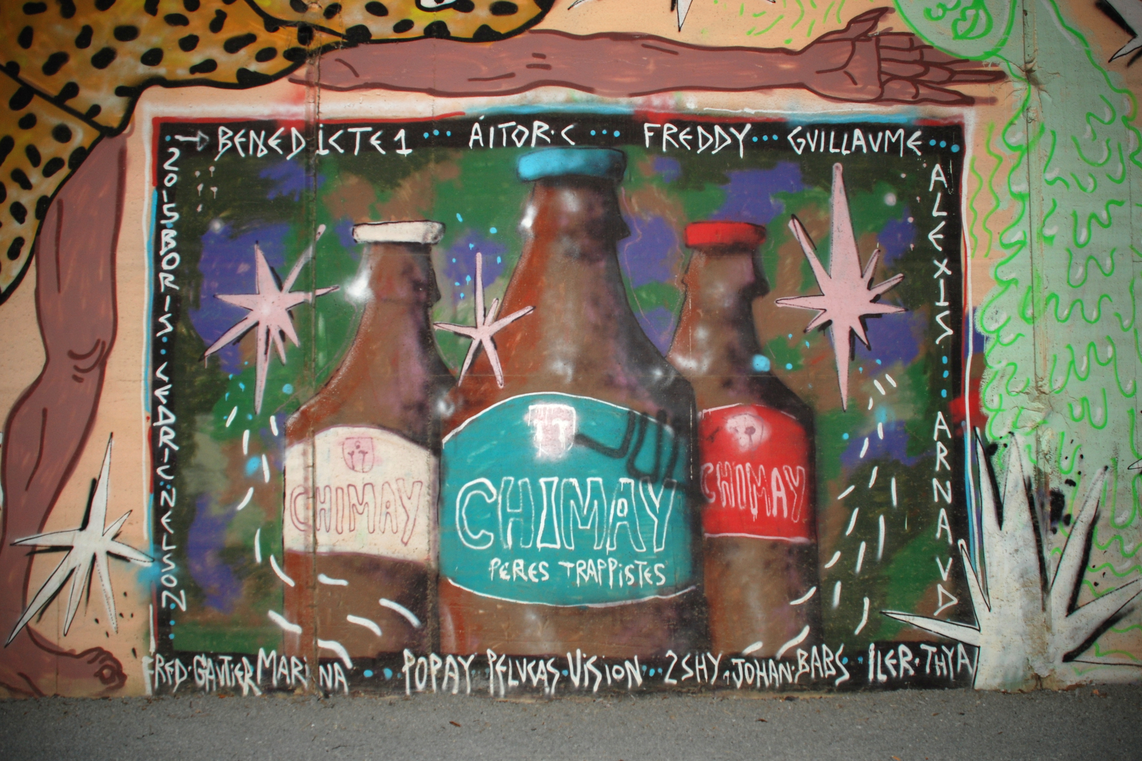 Belgique - Louvain-la-Neuve - Gare - Quai - Bières belges - Aitor Cara et Johan Baggio (Kosmopolite Art Tour 2015 à Louvain-la-Neuve)